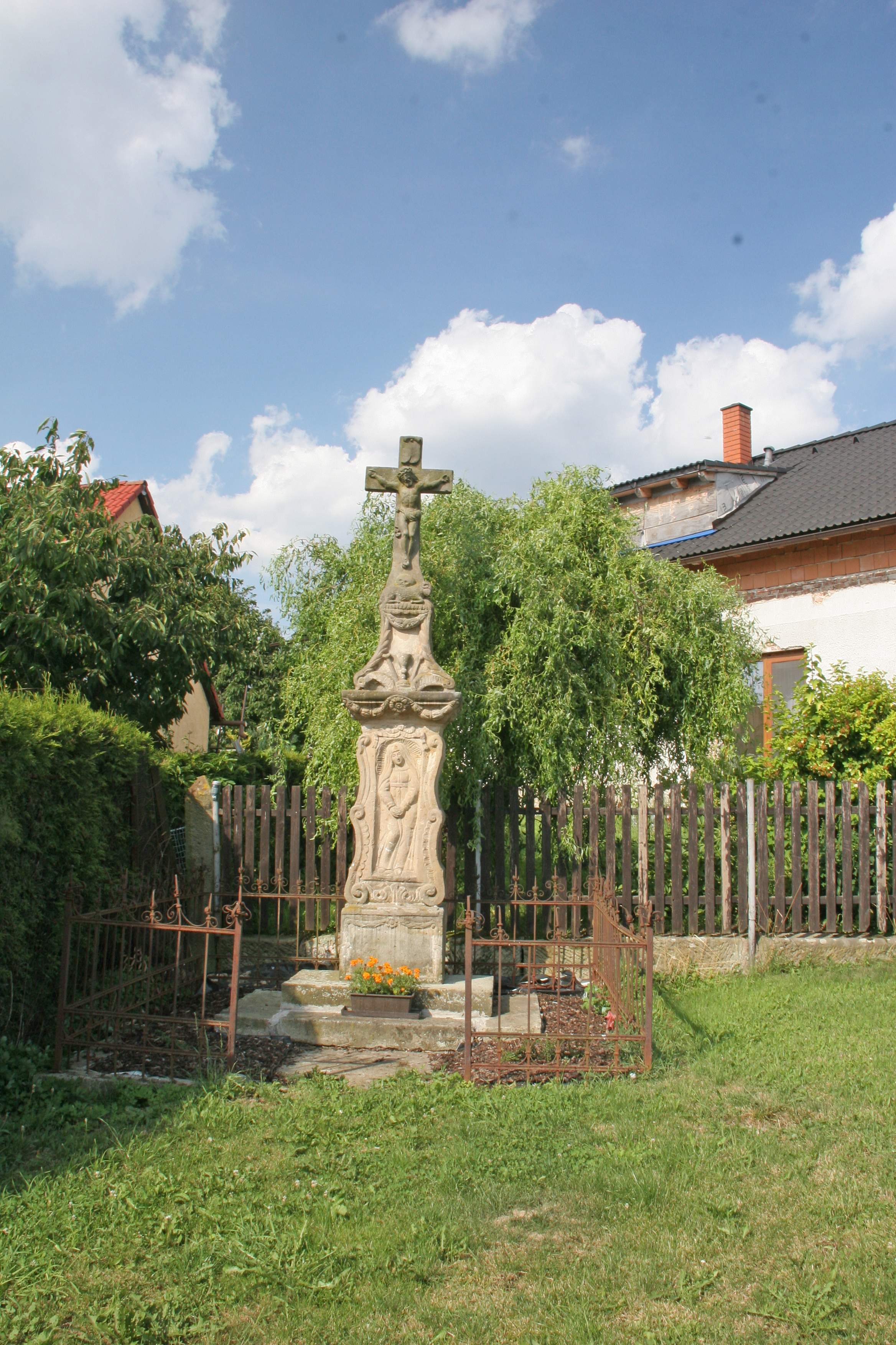 Vestec křížek